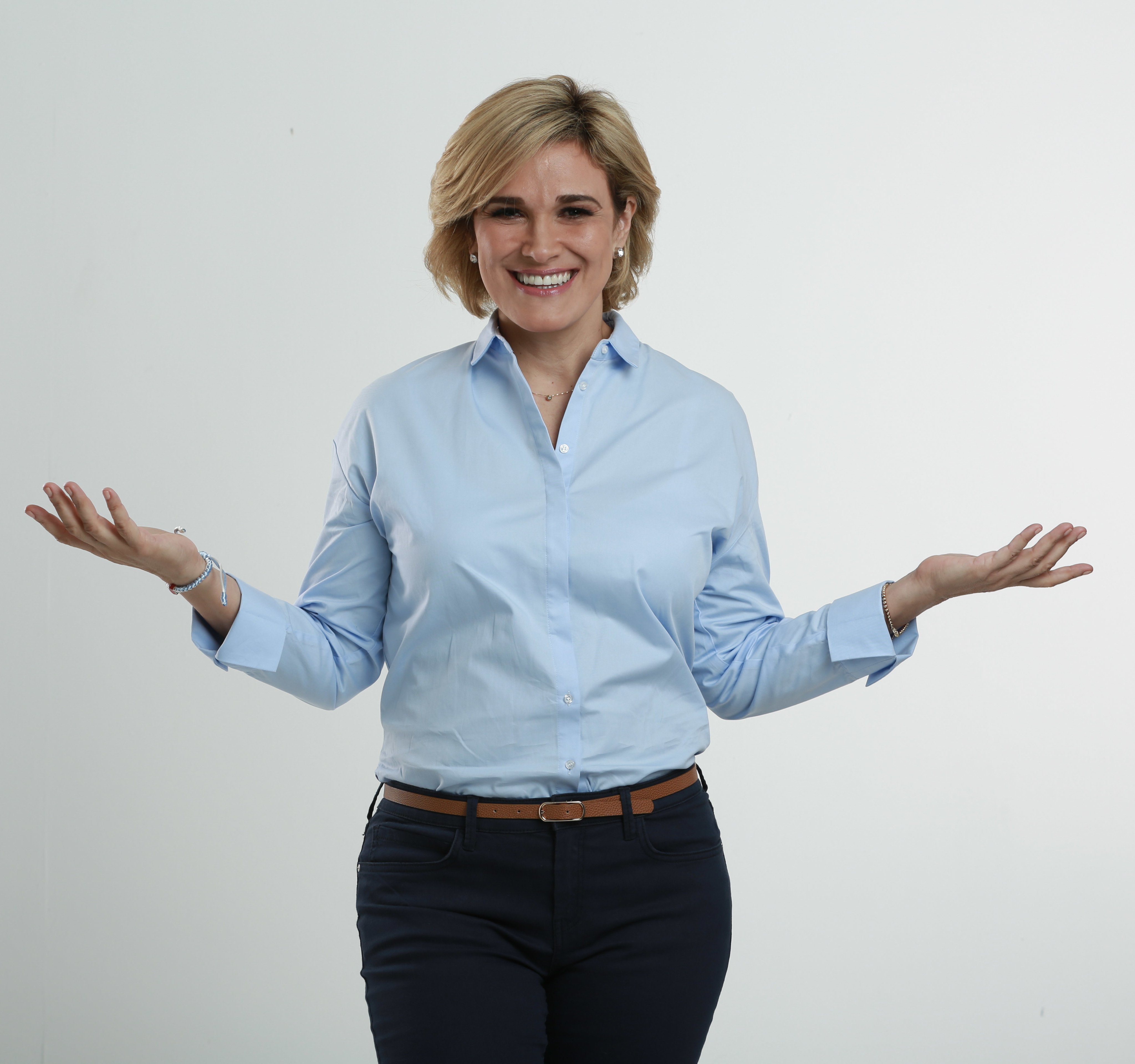 Cynthia Viteri en 2018